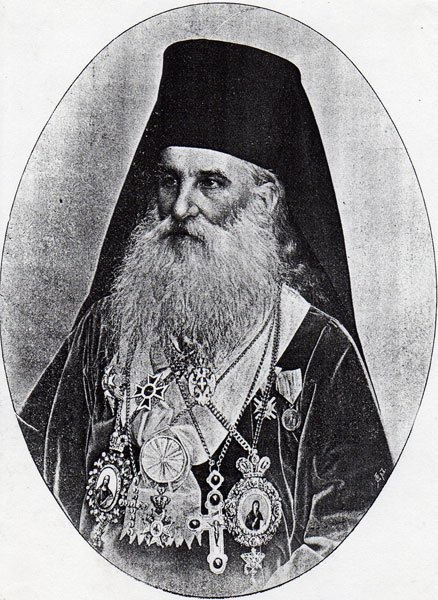 Митрополит београдски Инокентије (1840-1905), митрополит 1898-1905. Извор: фотографија око 1900.